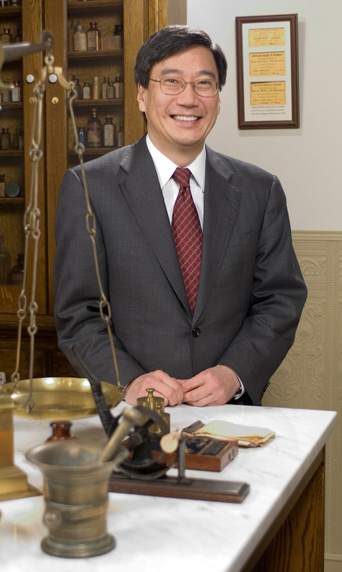 Peter S. Kim, Ph.D.